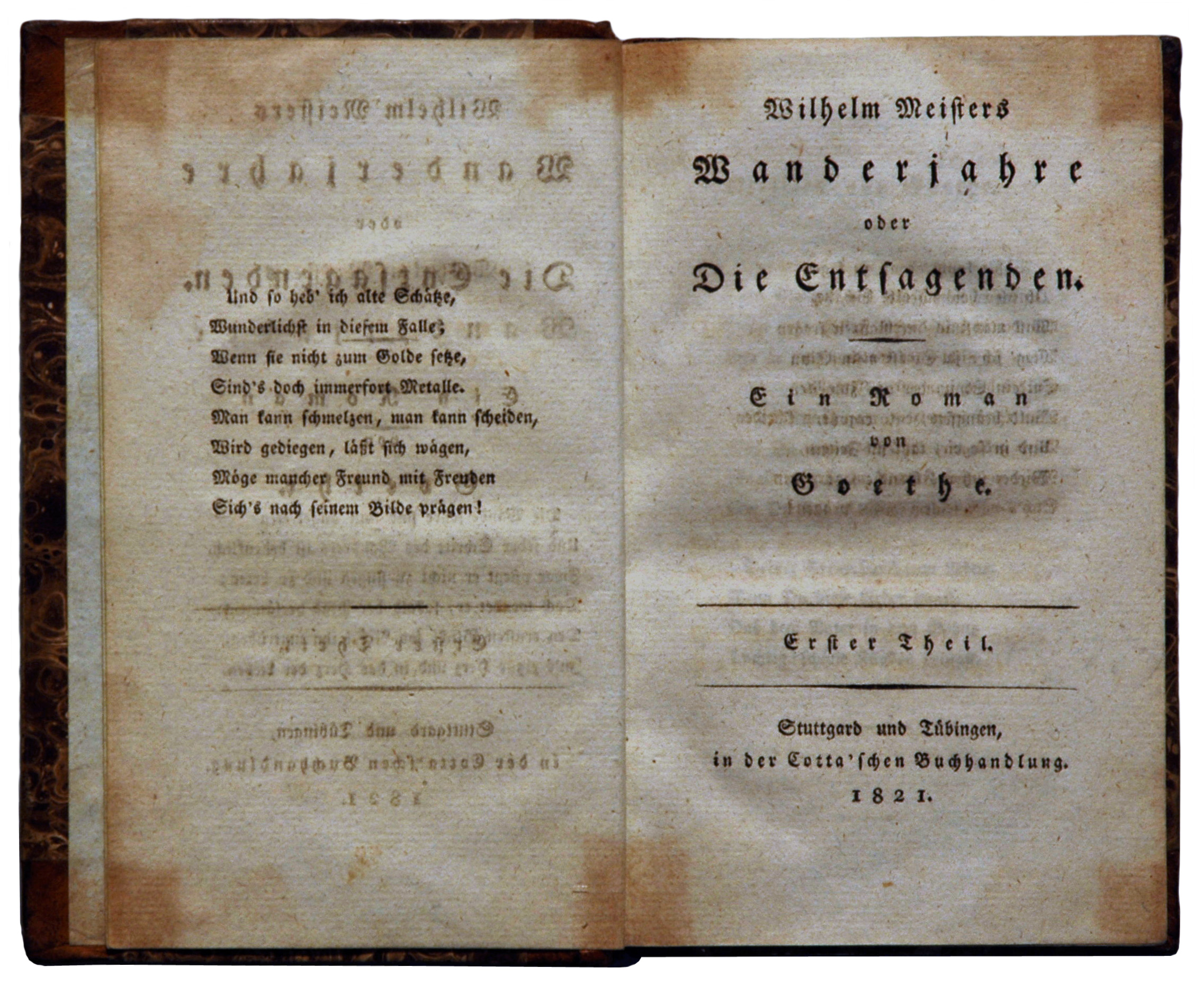 Goethe, Johann Wolfgang: Wilhelm Meisters Wanderjahre oder Die Entsagenden. Ein Roman von Goethe. Erster Theil.Erstdruck. Ecken leimschattig. Einband